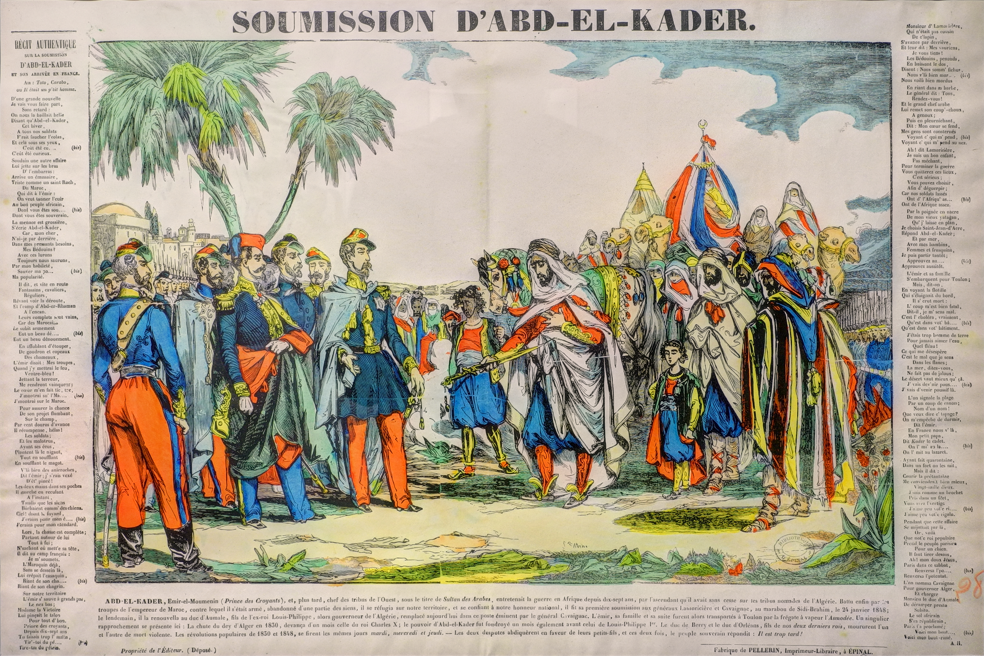 Musée d'Histoire : Soumission d'Abd-el-Kader (HDR). Pellerin, imprimeur ; Jean-Baptiste Vanson (Épinal, 1820 - Épinal, 1870). XIXe siècle, estampe sur papier colorié au pochoir, Épinal Coll. Musée de l'image, Épinal, N°inv. D 990.2.55 C